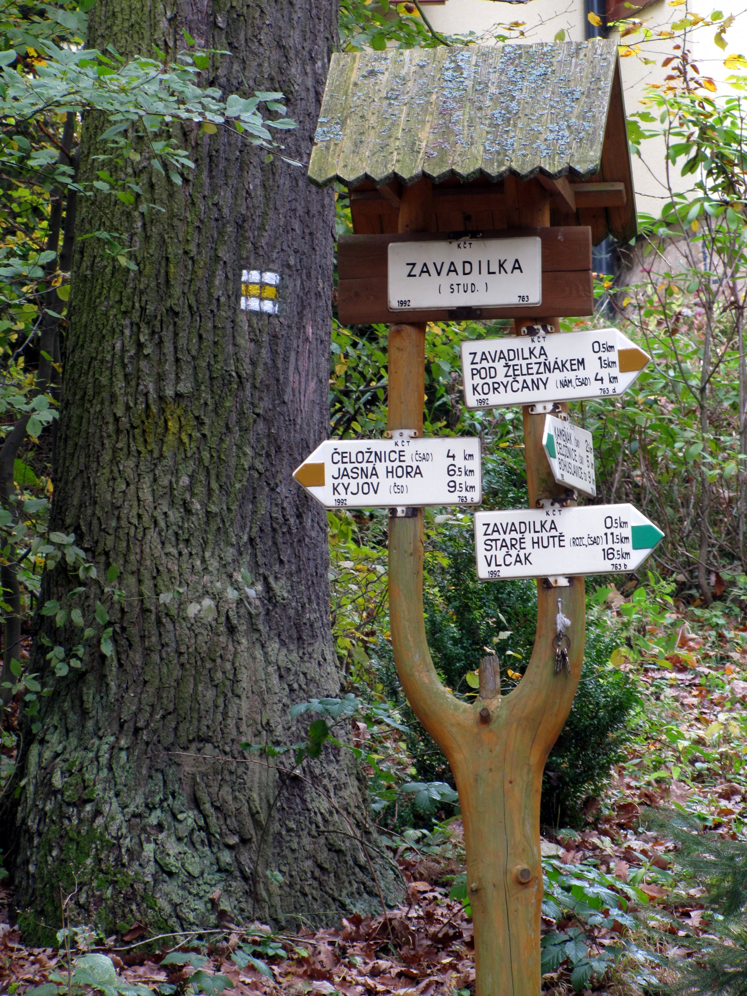 Turistický rozcestník u chatové osady Zavadilka v katastru Moravan, okres Hodonín, pohoří Chřiby